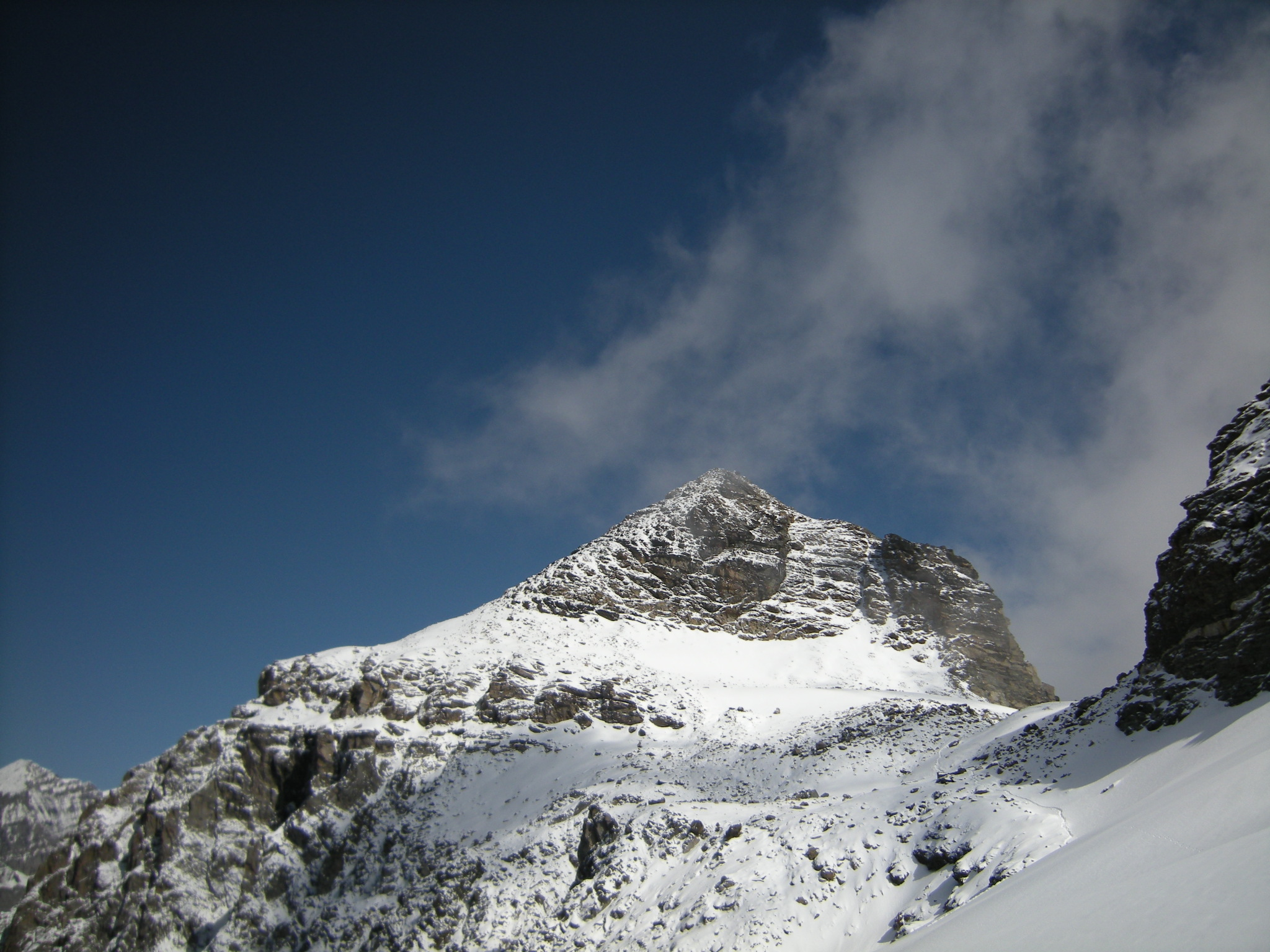 Gipfelpyramide des Hockenhorn, gesehen von Westen aus. Rechts das kleine Hockernhorn